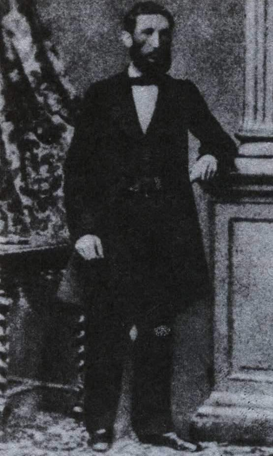 Ignacy Mystkowski (born 1826)